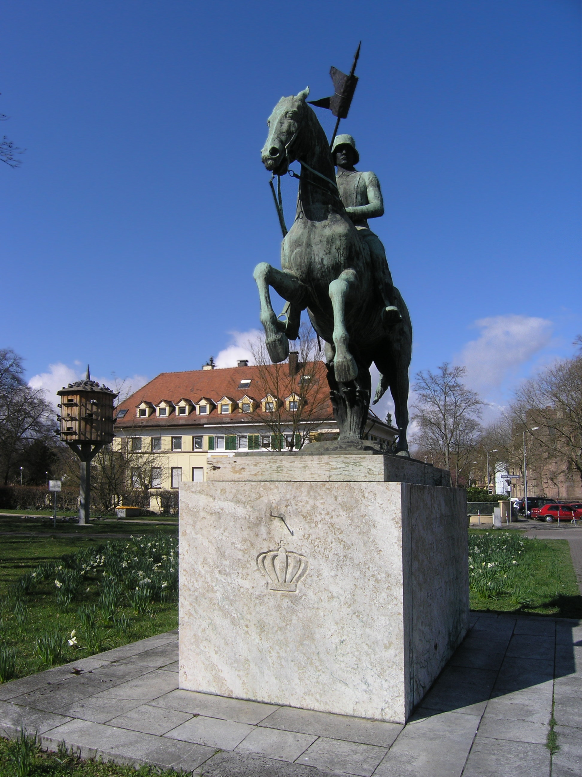 Leibdragonerdenkmal in Karlsruhe